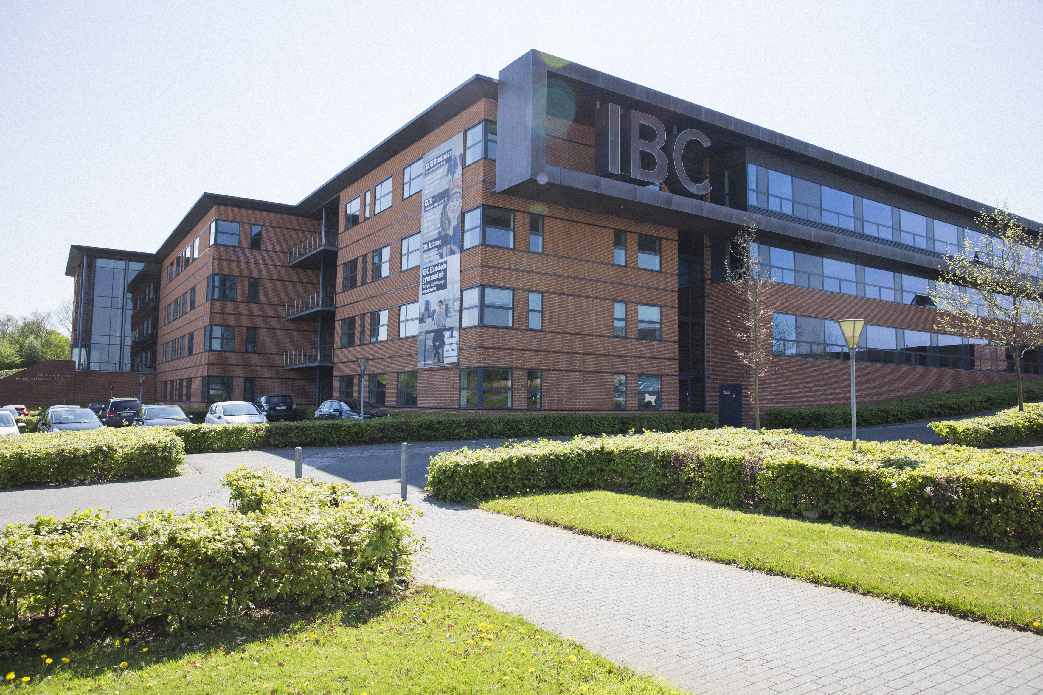 IBC Kolding